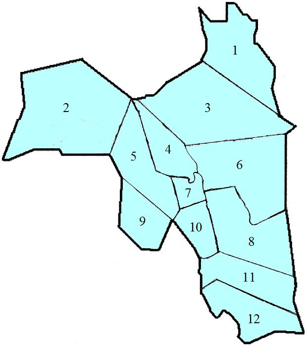 Lapinjärven kartta, johon on numeroitu kylät: 1. Kimonkylä, 2. Porlammi, 3. Pukaro, 4. Vasarankylä, 5. Ingermaninkylä, 6. Lindkoski, 7. Kirkonkylä, 8. Heikinkylä, 9. Rutumi, 10. Pekinkylä, 11. Lapinkylä, 12. Harsböle